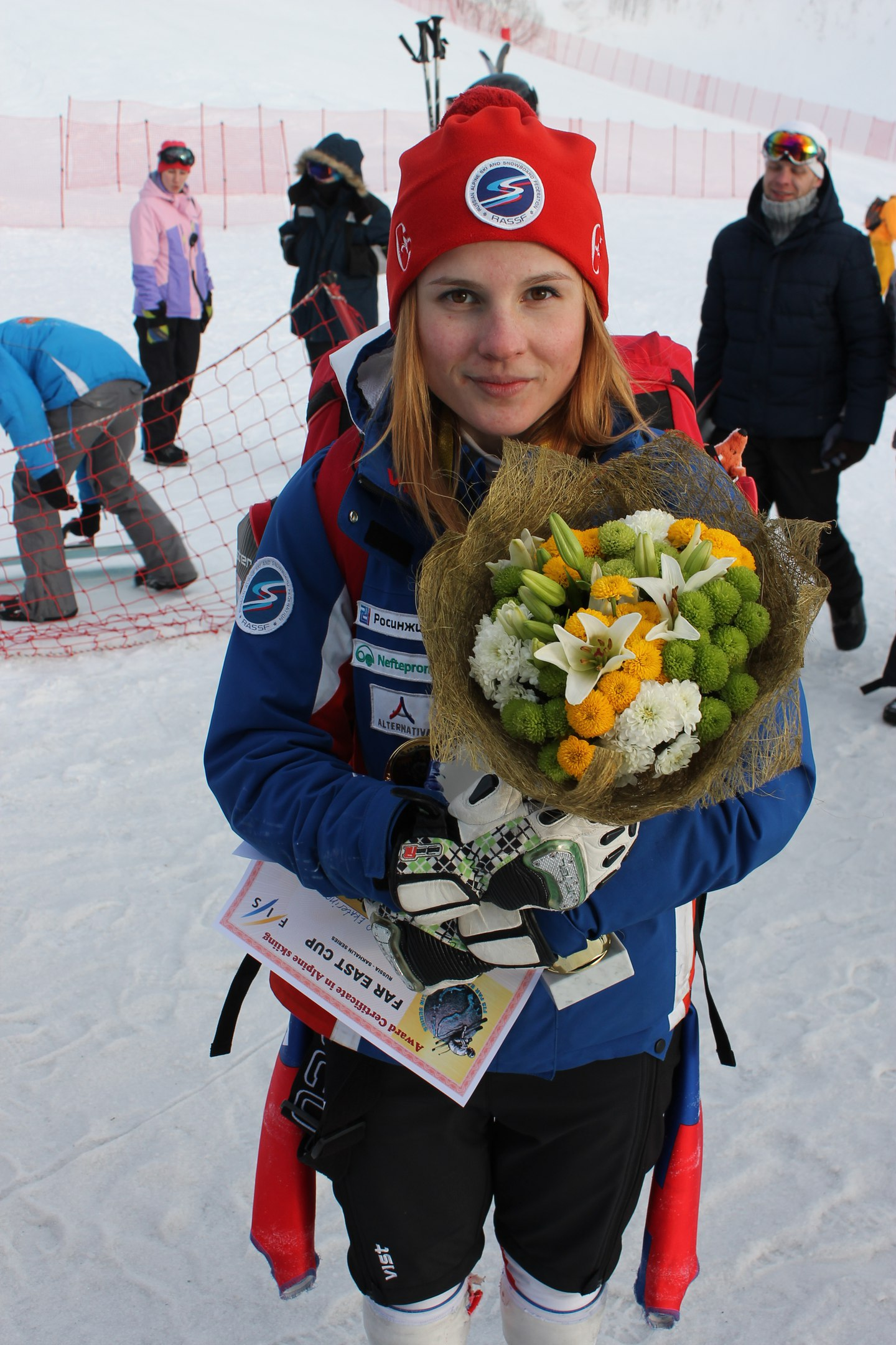 Екатерина Ткаченко Кубок Азии и Дальнего Востока, Южно-Сахалинск, март 2016 года